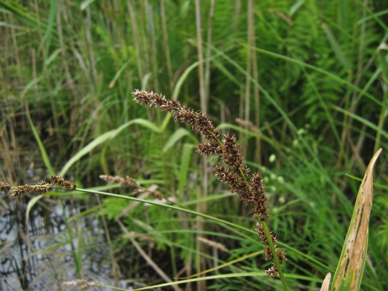 Rispen-Segge Carex paniculata, Weißer See, Mecklenburg-Vorpommern